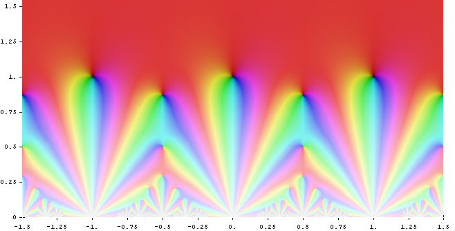 Eisenstein series G_10